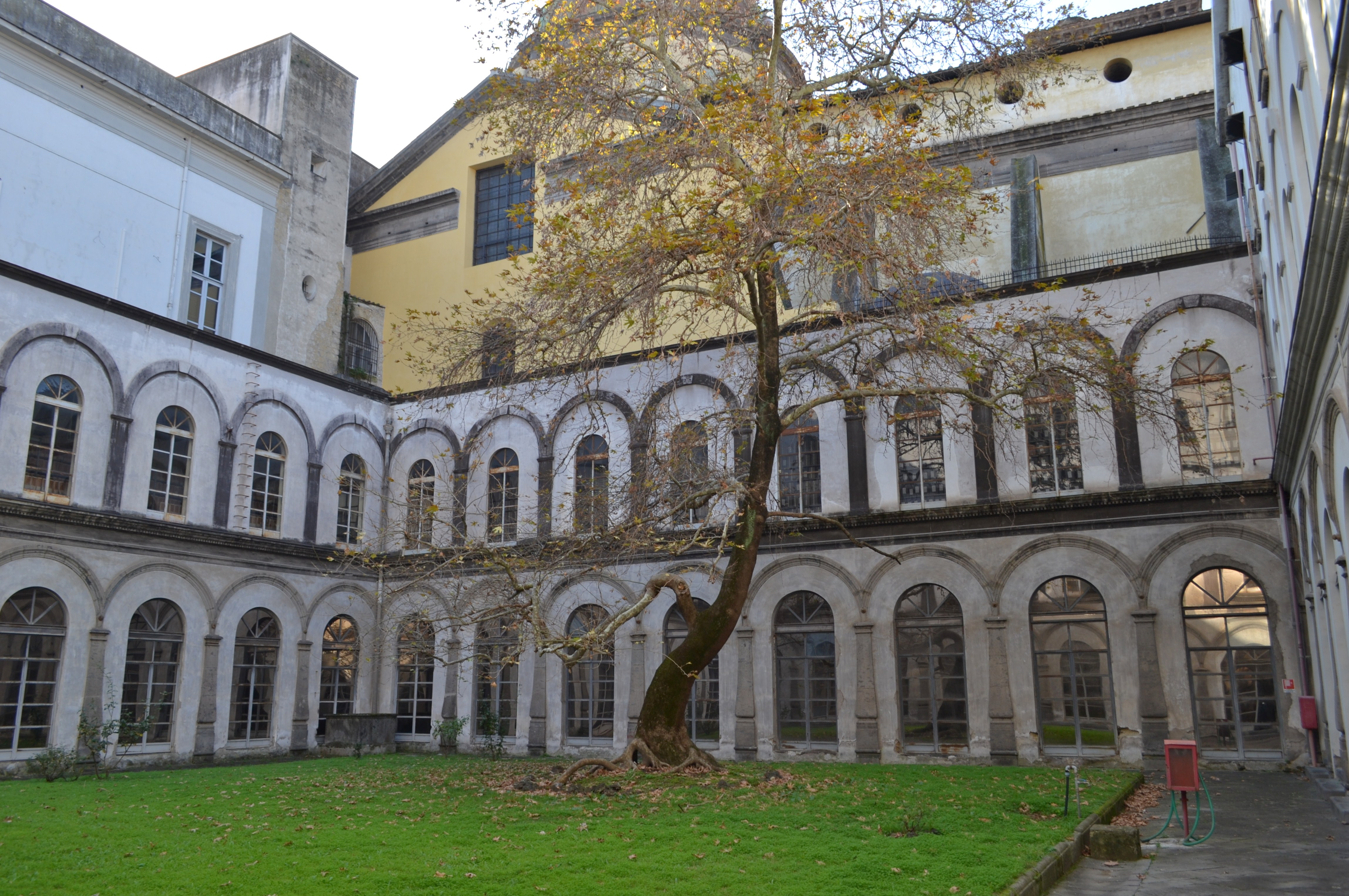 Chiostro del Platano - Convento dei Santi Severino e Sossio di Napoli